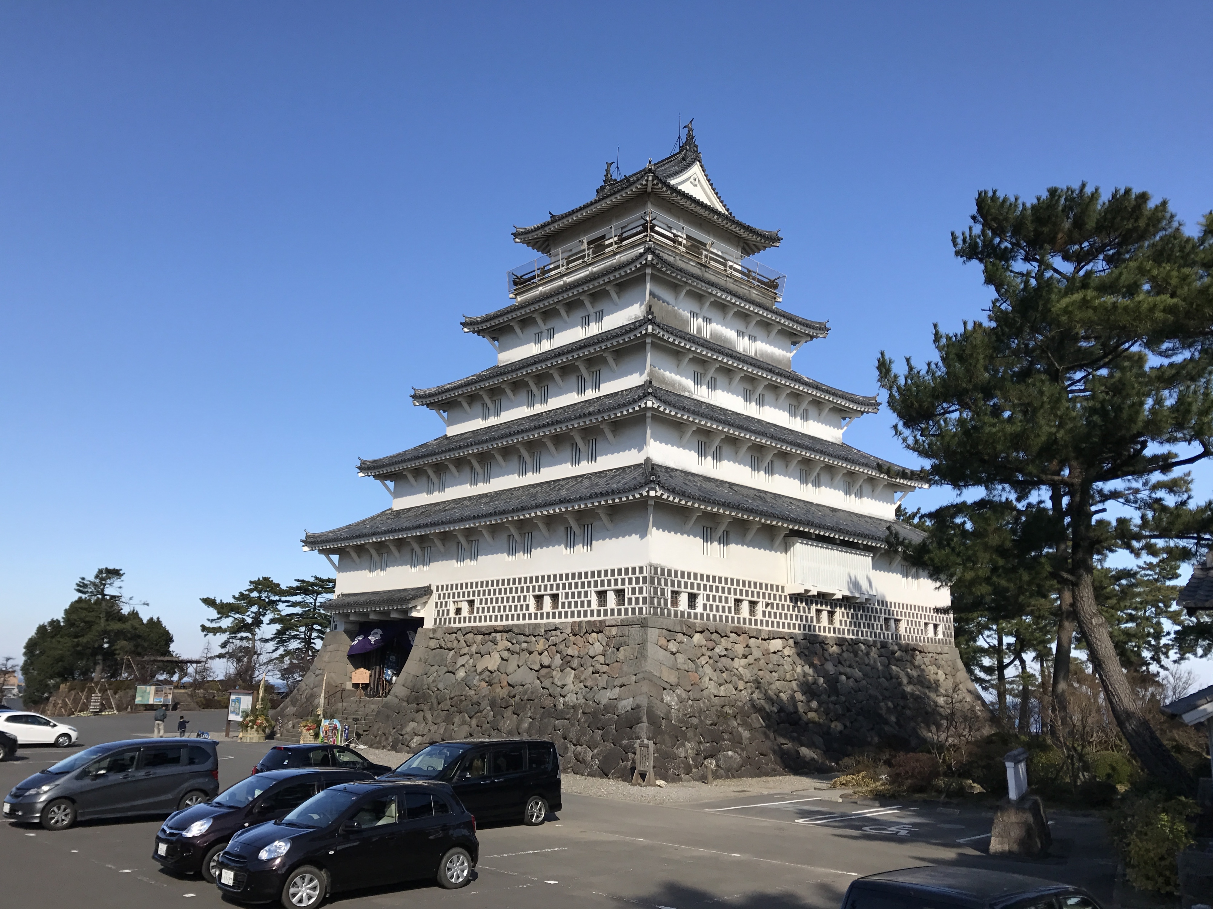 島原城の天守閣